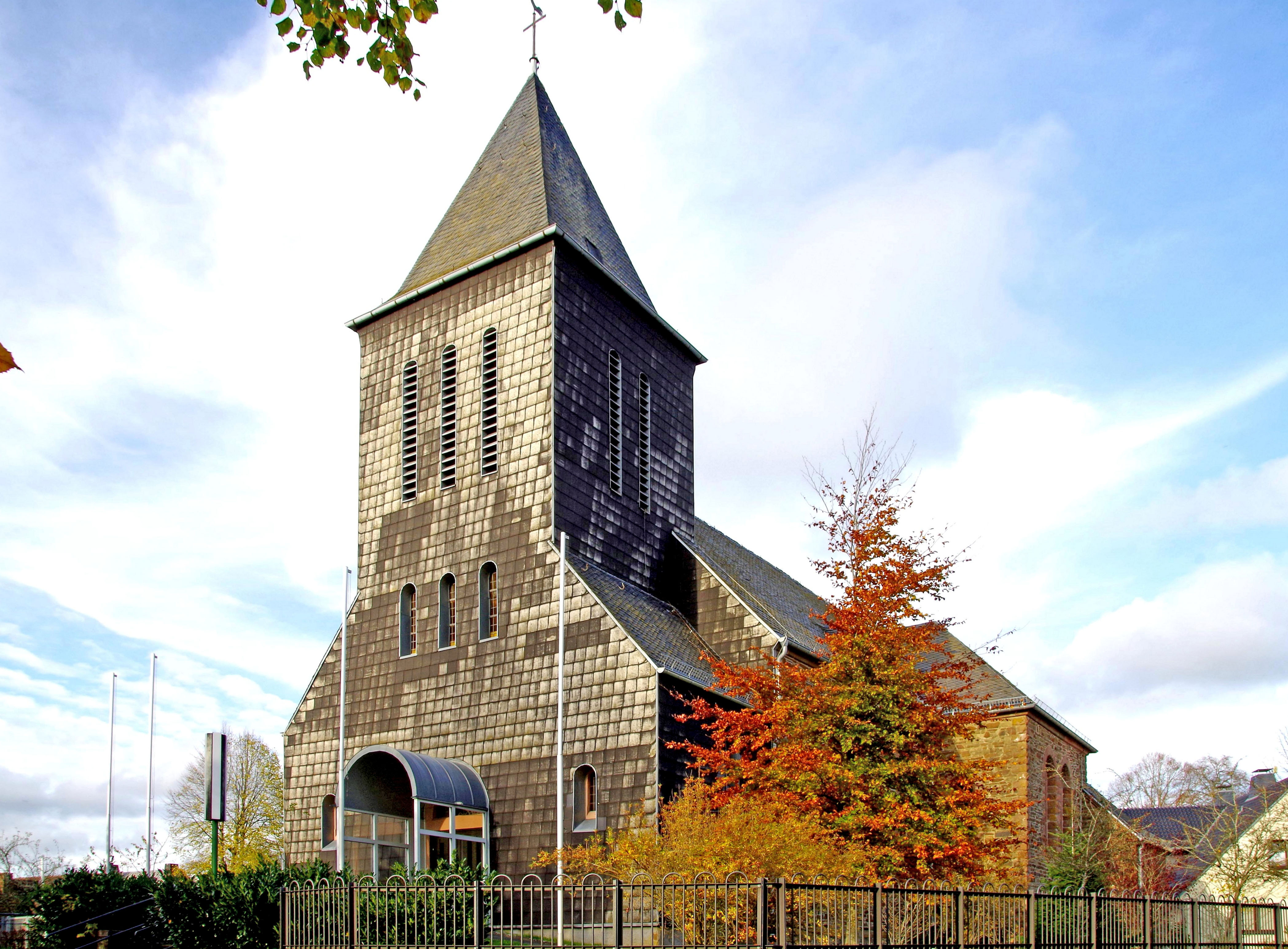 St. Hubertus (Udenbreth), Turmfassade im Westen